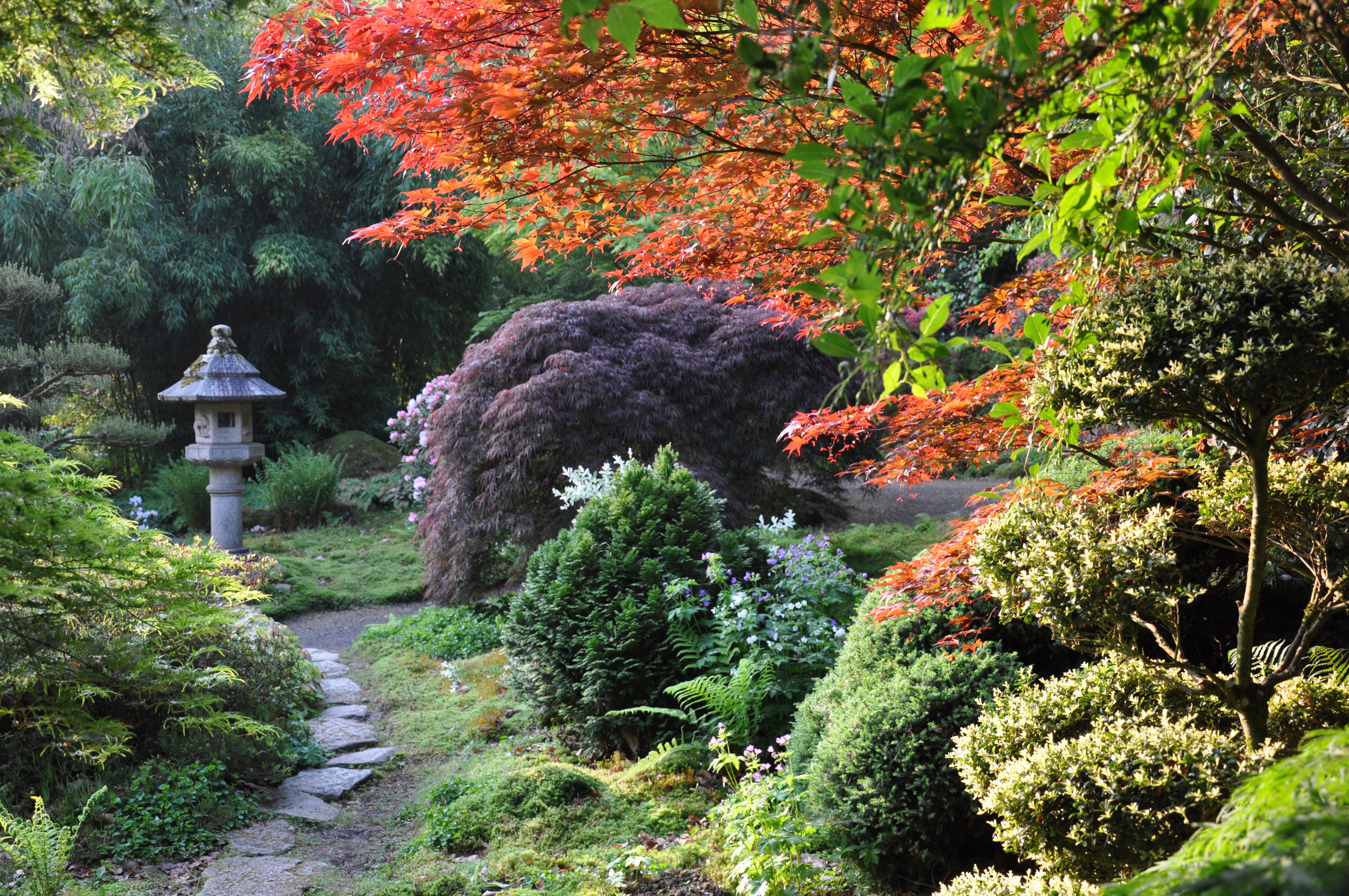 Au Parc Botanique de Haute Bretagne